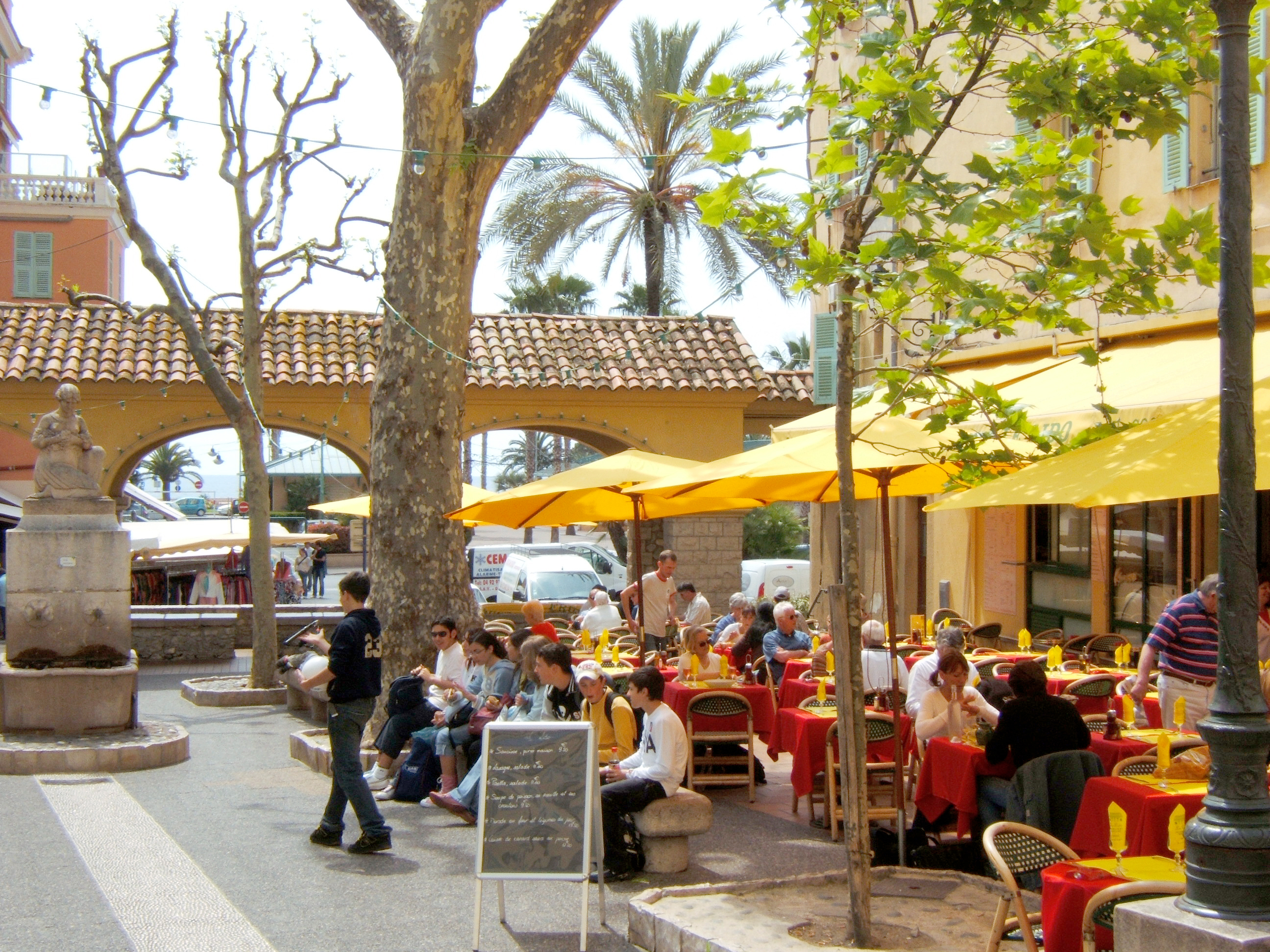 A Menton, la places aux Herbes située entre la rue Saint-Michel et la rue des Marins.